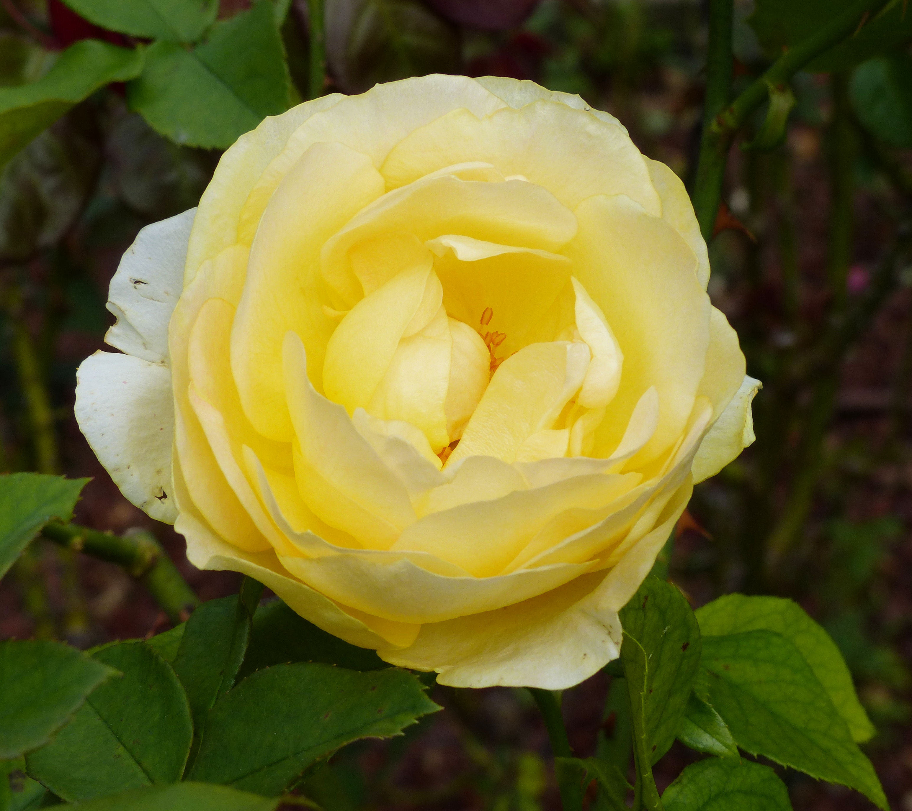 Rose Beatrice I d’Este, gezüchtet von den Rosenzüchtern Georges Delbard